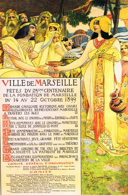 Affiche réalisée par David Dellepiane (1866-1932) en 1899 pour le 25ème centenaire de la fondation de Marseille.